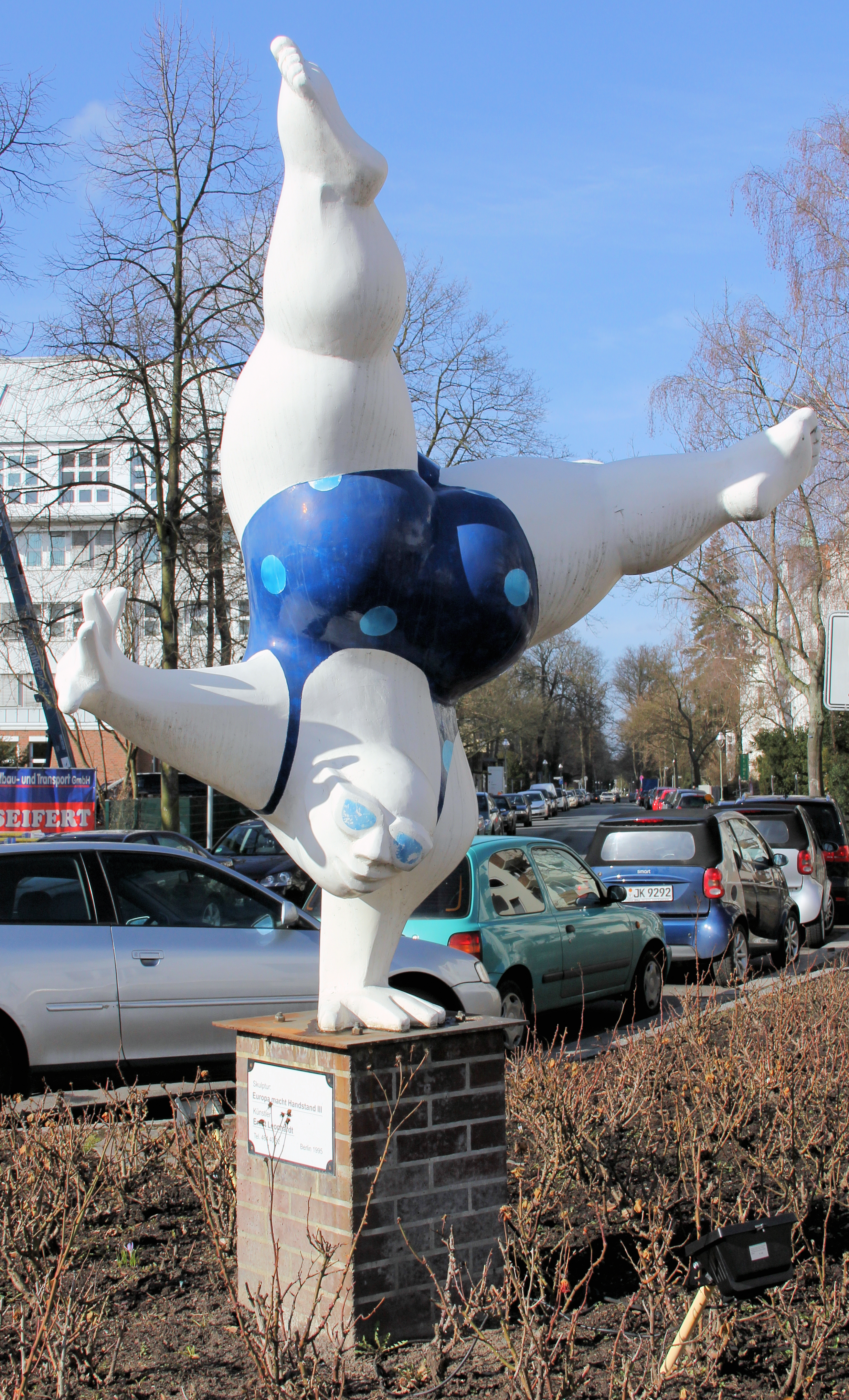 Statue, Europa macht Handstand III, von Ernst Leonhardt, 1995, Grieser Platz, Berlin-Schmargendorf, Deutschland